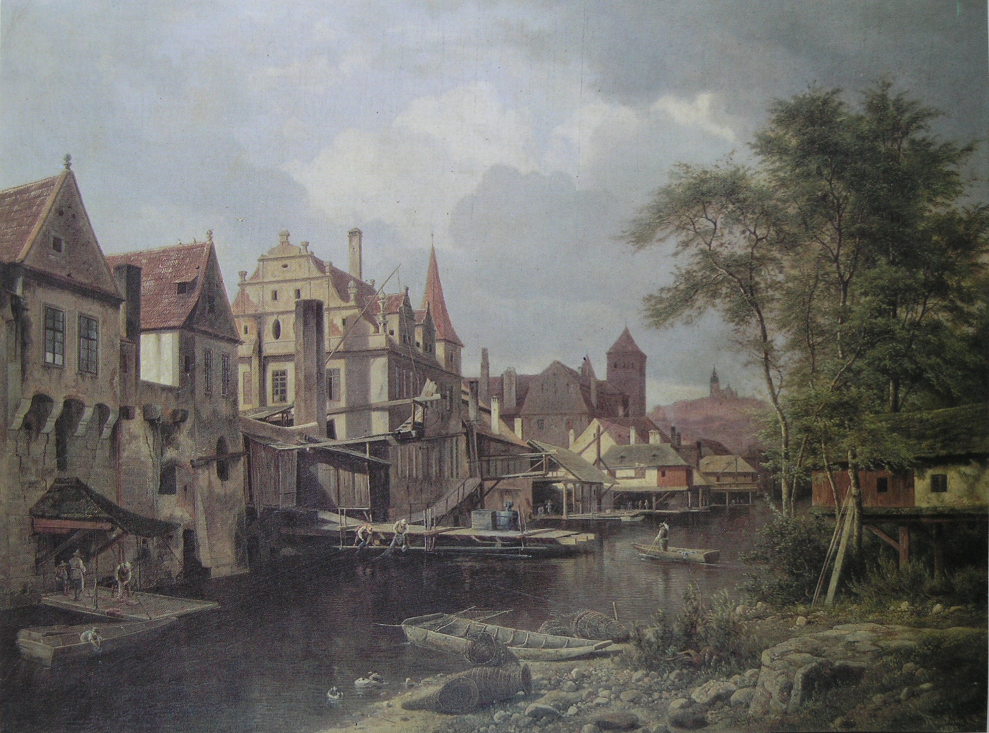 Česky: Helmovy mlýny (olej, plátno, 55×72)